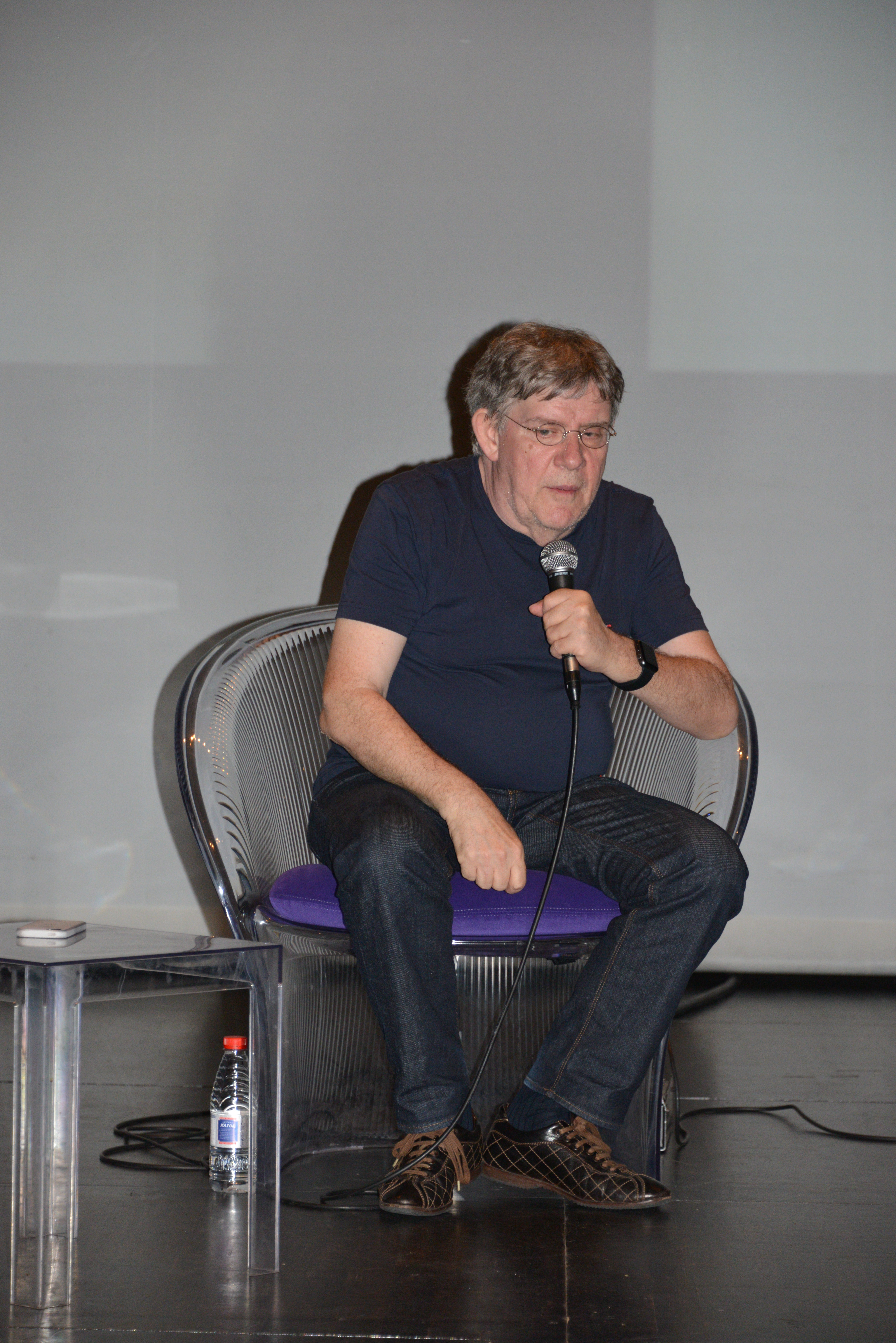 Le cinéaste roumain Andrei Ujică lors de la Rencontre avec le public au Théatre Verdière de la Coursive (scène nationale de France) le mercredi 5 juillet 2017 à 16h15. Rencontre avec Andrei Ujică, Festival International du Film de La Rochelle 2017. La Rochelle, Charente-Maritime, France.